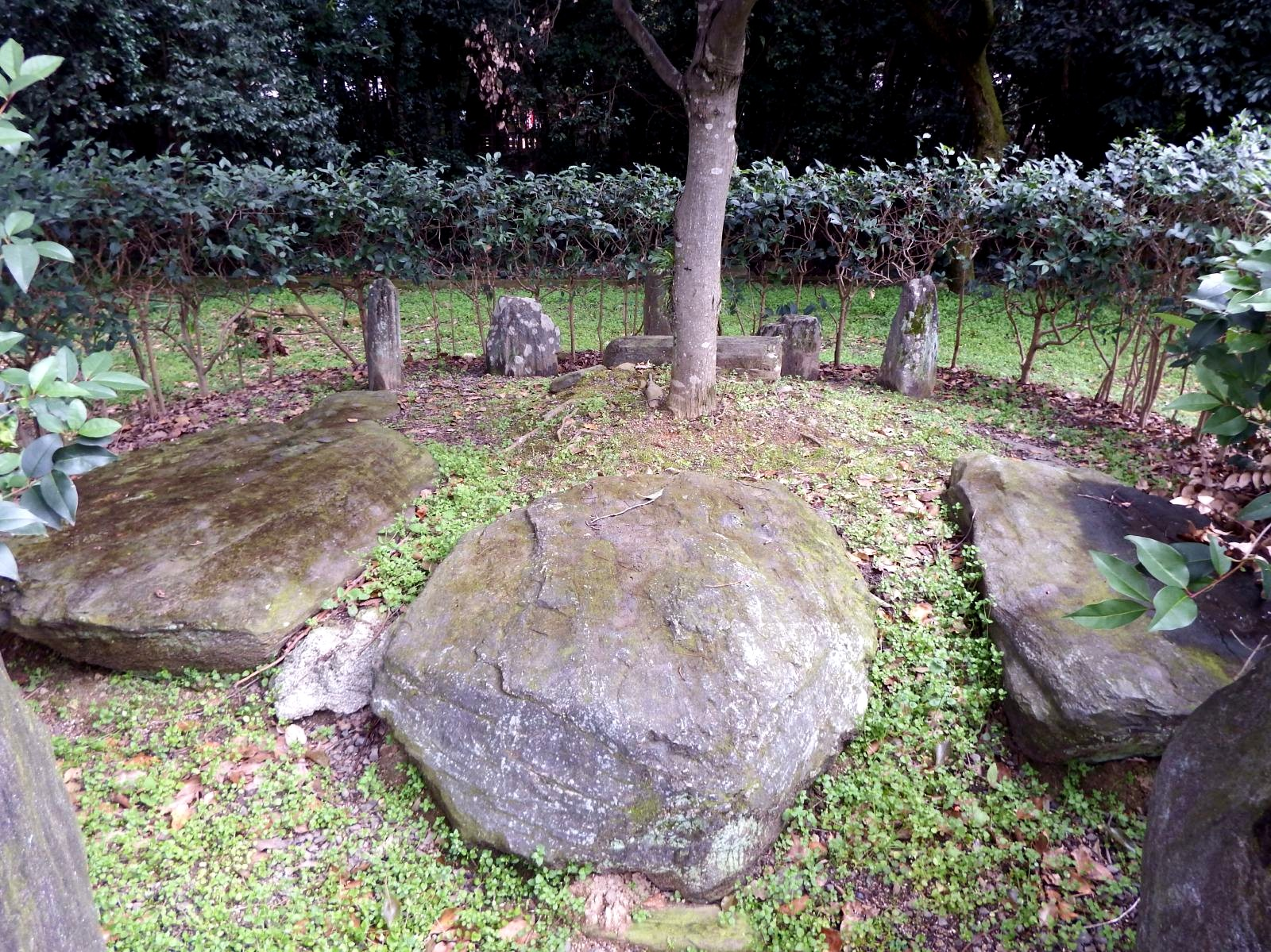 下福古墳の遺石